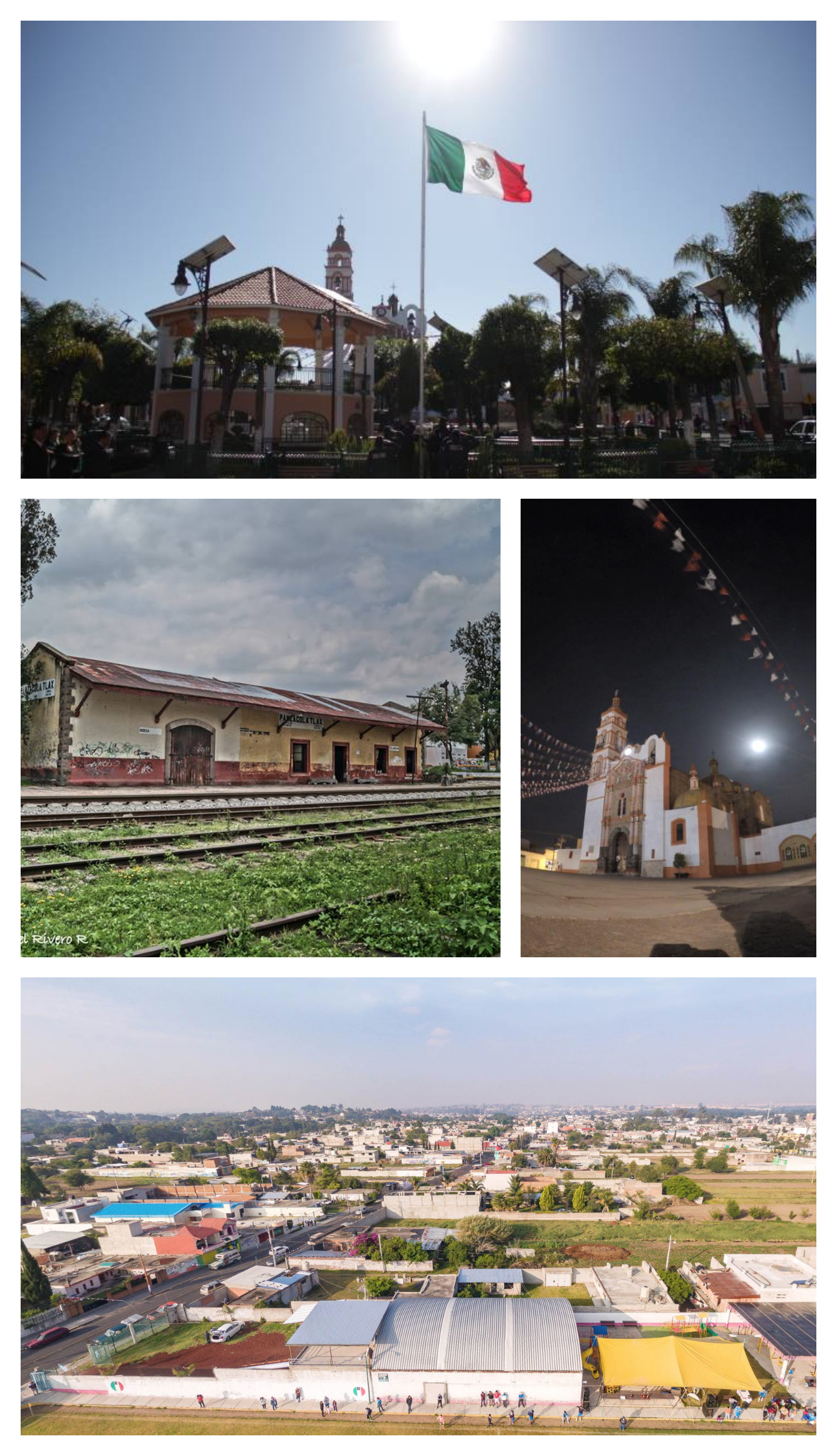 Montaje de la ciudad de Papalotla basado en las siguientes imágenes de Wikimedia Commons